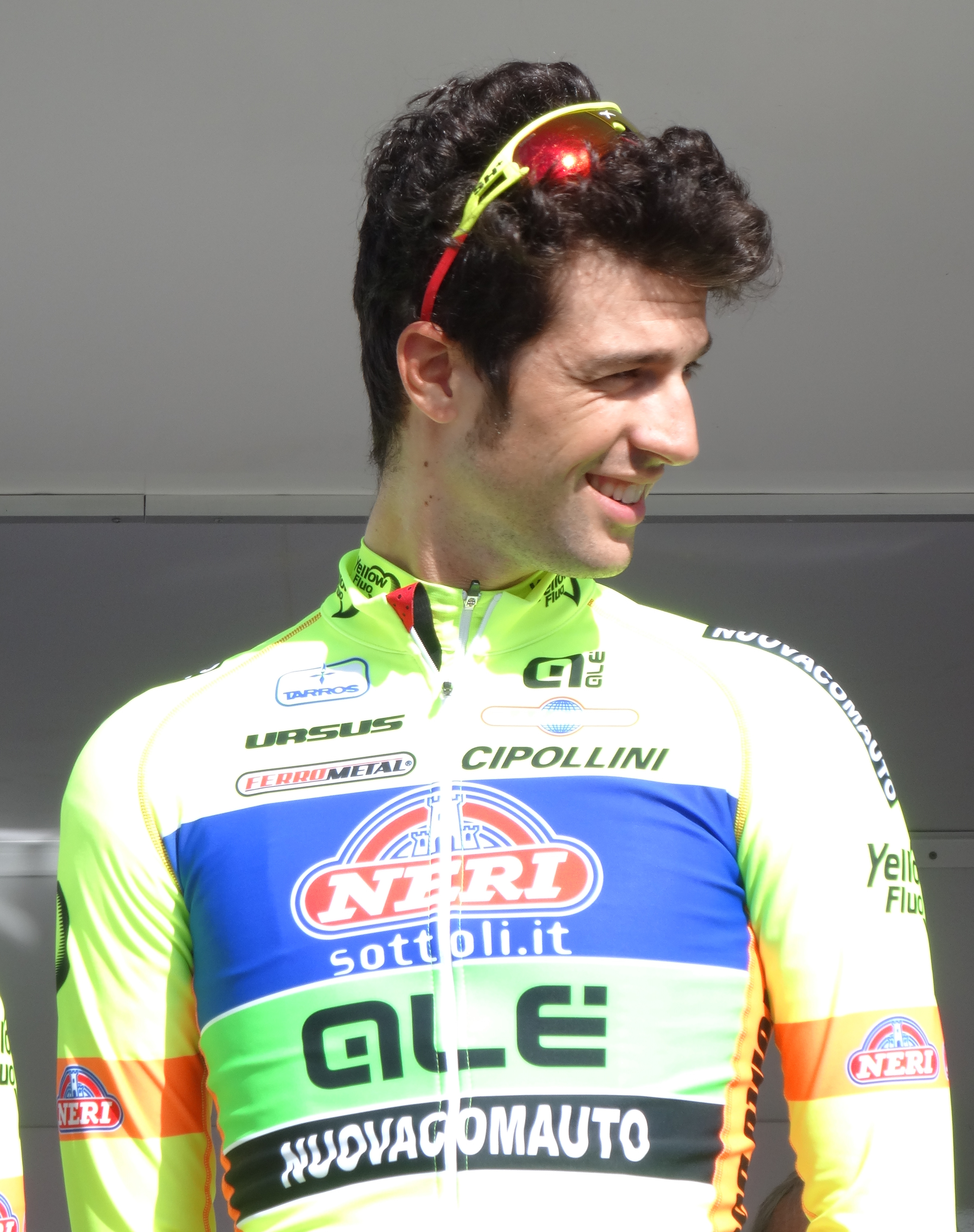 Reportage réalisé le jeudi 17 avril à l'occasion du départ et de l'arrivée du Grand Prix de Denain 2014 à Denain, Nord, Nord-Pas-de-Calais, France.